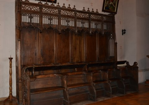 XV éme siècle.